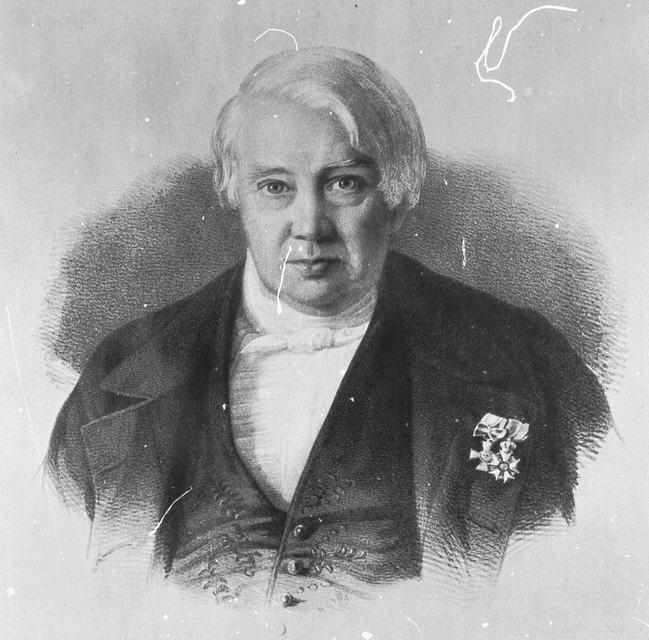 Peter Heinrich Merkens, Lithographie, Kölnisches Stadtmuseum, Inv.-Nr. HM 1921/20 (Ausschnitt). Nach einem Portrait von Theodor Hildebrandt (?).